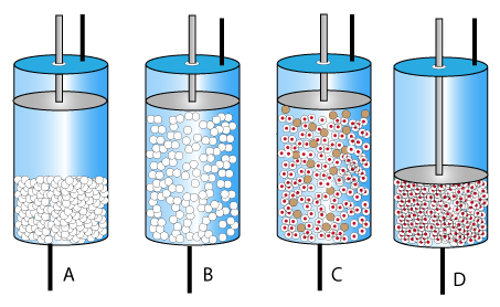 Processteg för expanderad Bäddadsorption (EBA)